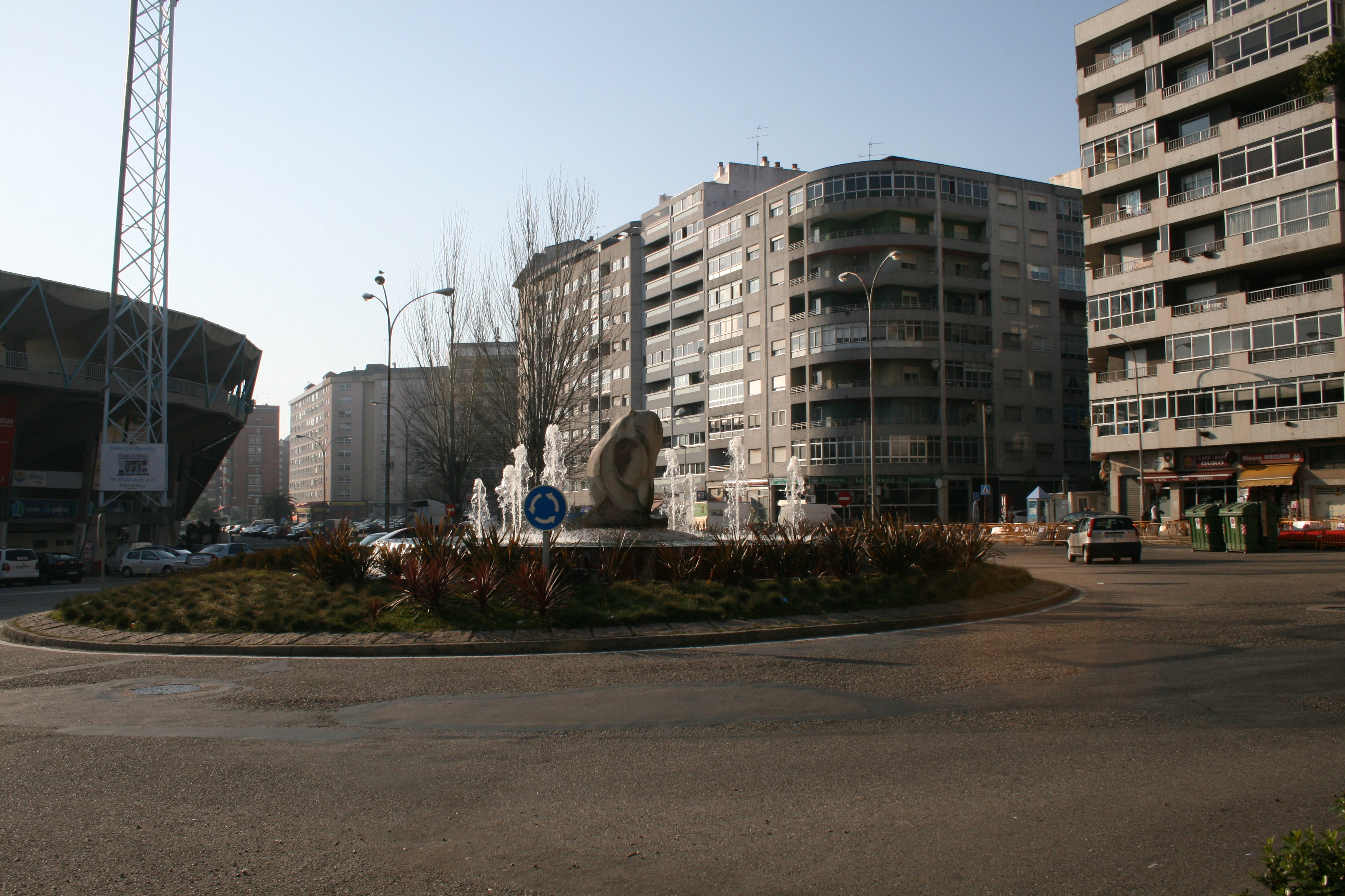 Balaidos Rotonda con que será?